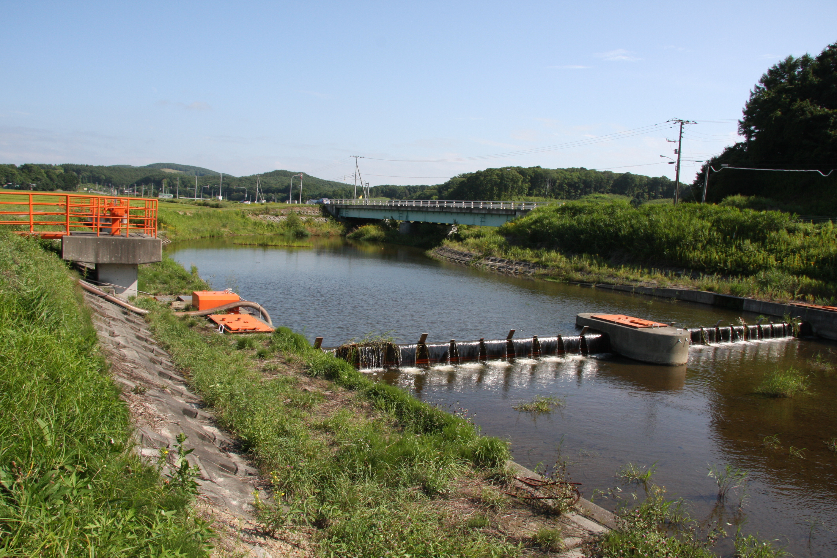 ウクル川 井堰１号堰より望む